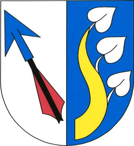 znak, Drahonice, okres Strakonice